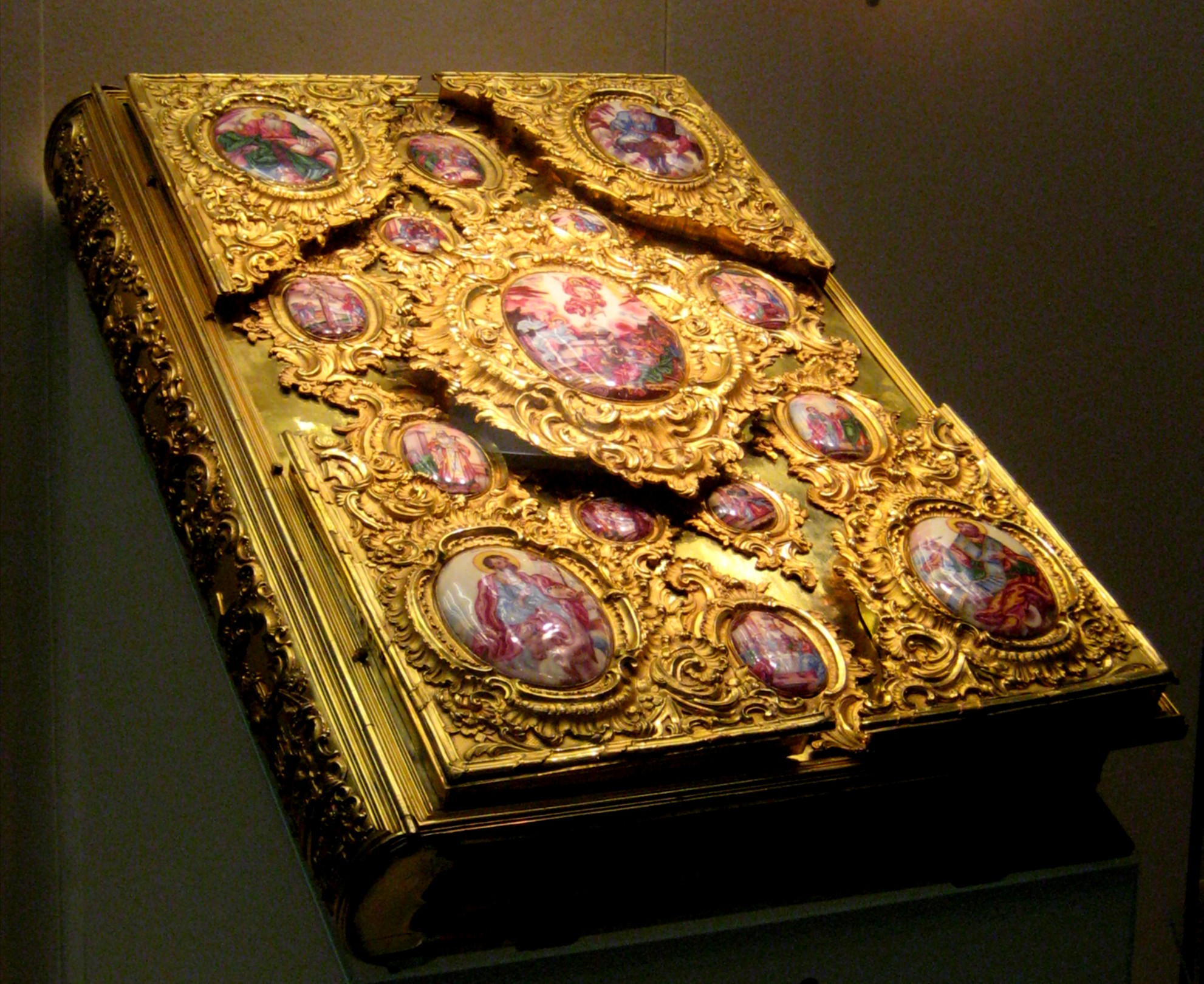 Gospel Books. Eвангелие в окладе, 1772 год, Москва.